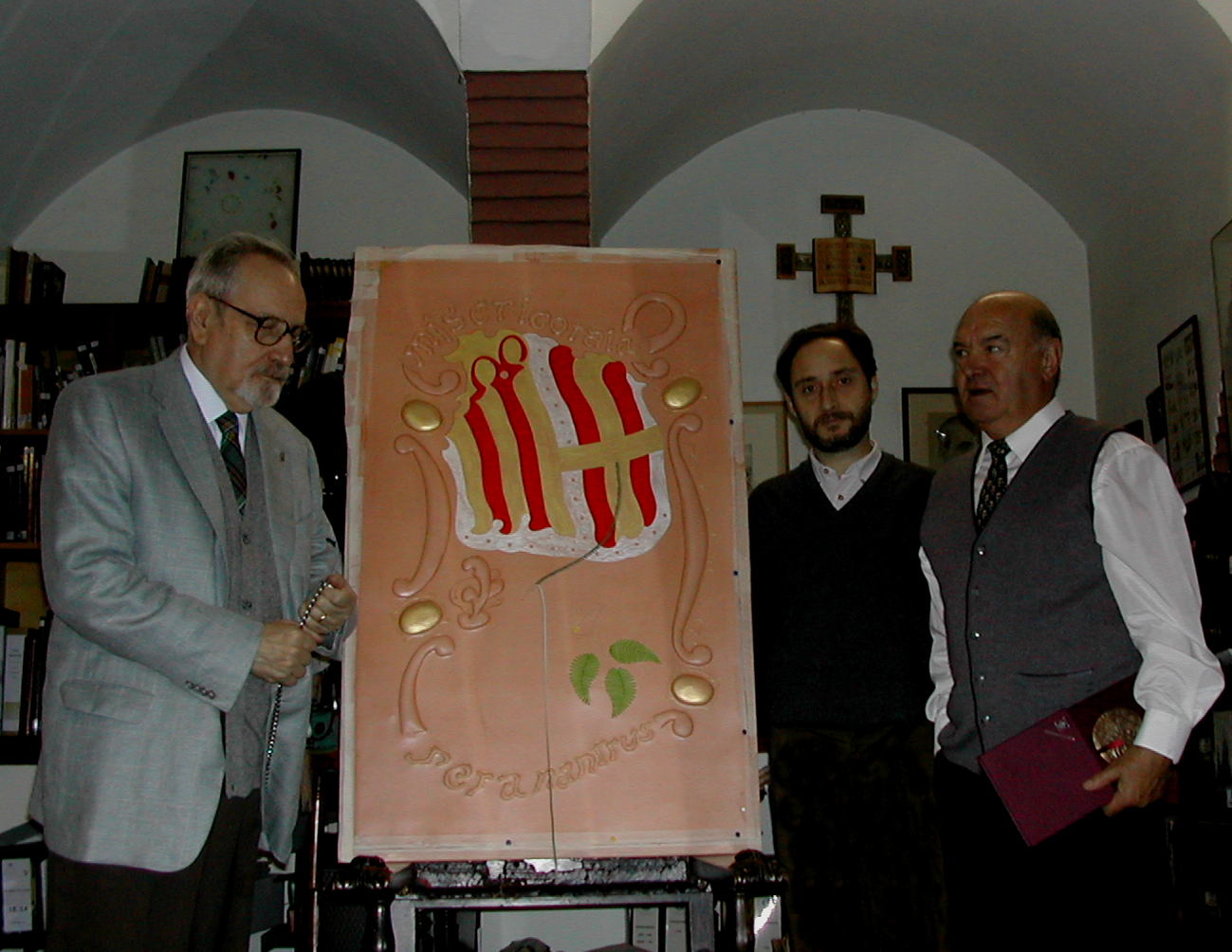 Fotografía de la reconstrucción del estandarte de la Virgen de la Misericordia proyectado por Gaudí para la procesión de los reusences residentes en Barcelona al Santuario de la Misericordia de Reus en 1900 en estado de construcción en 2005. El proyecto de reconstrucción fue realizaddo por Joan Bassegoda Nonell, Bibiana Sciortino y Mario Andruet, arquitectos, en 2003. En la fotografía tomada en los Pabellones Güell de Barcelona, sede de la Cátedra Gaudí, Joan Bassegoda Nonell, Conservador del archivo de la Cátedra, Mario Andruet, investigador y colaborador de la Cátedra Gaudí y Enric Ferrer Solà, el artesano que realizó la reconstrucción. Foto Fundación Antonio Gaudí.